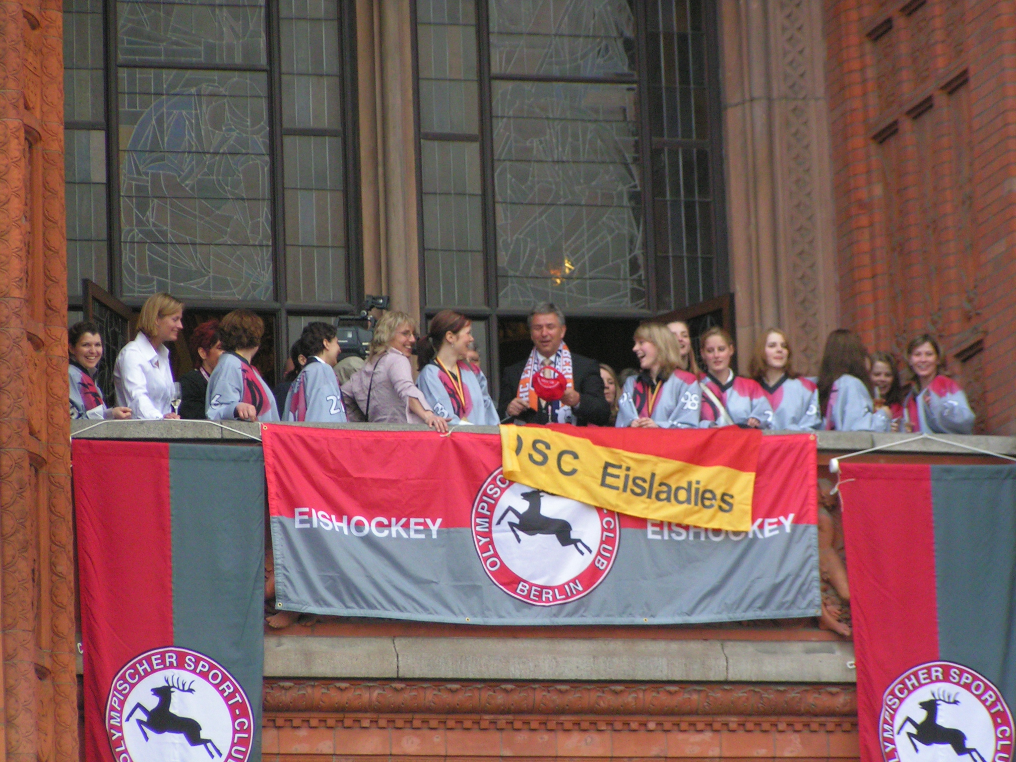 Empang des Deutschen Eishockeymeister der Frauen 2006 OSC Berlin durch Klaus Wowereit auf dem Balkon des Berliner Rathauses